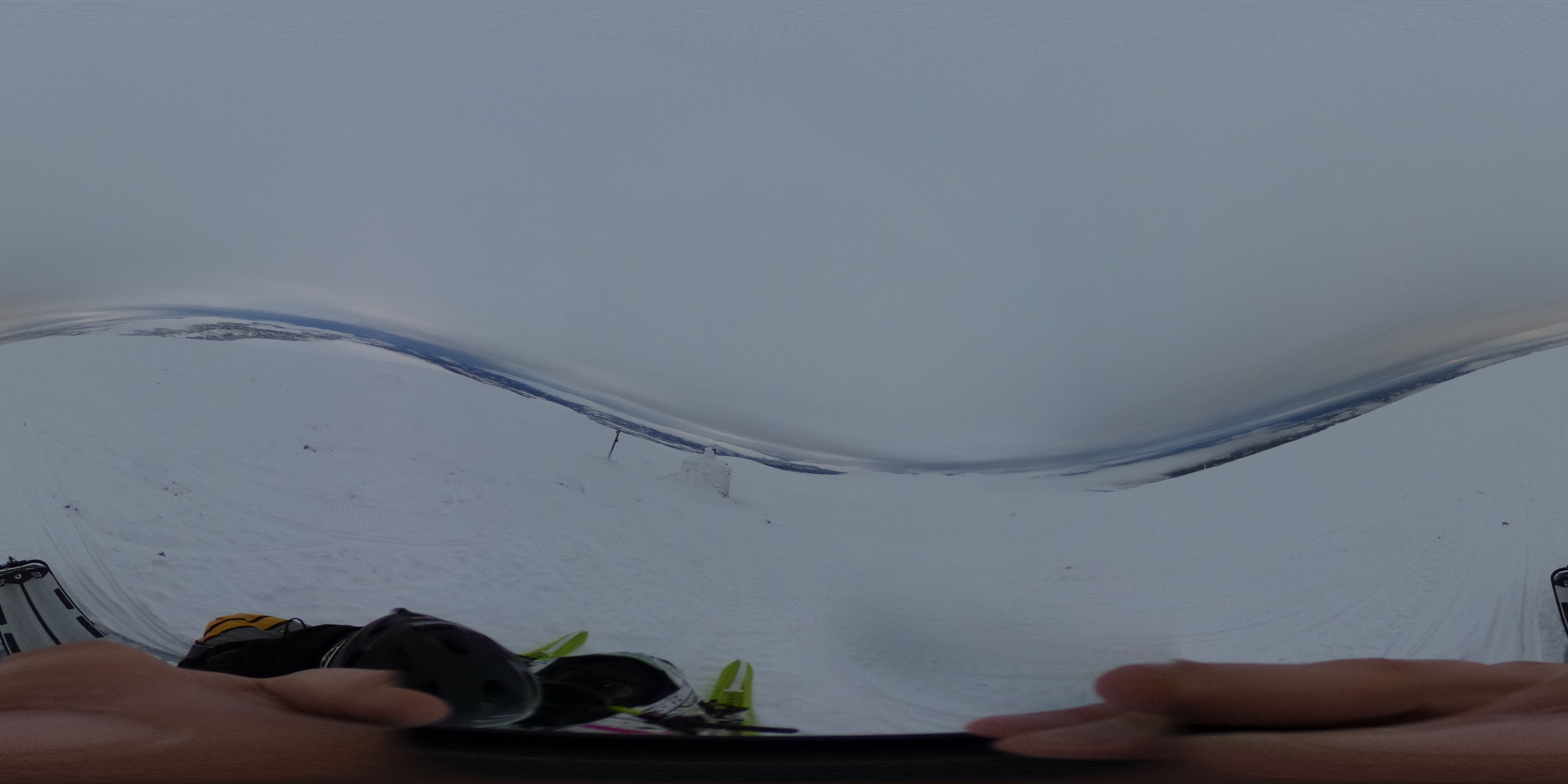 Østerhågna, östra toppen på Härjåhågna.